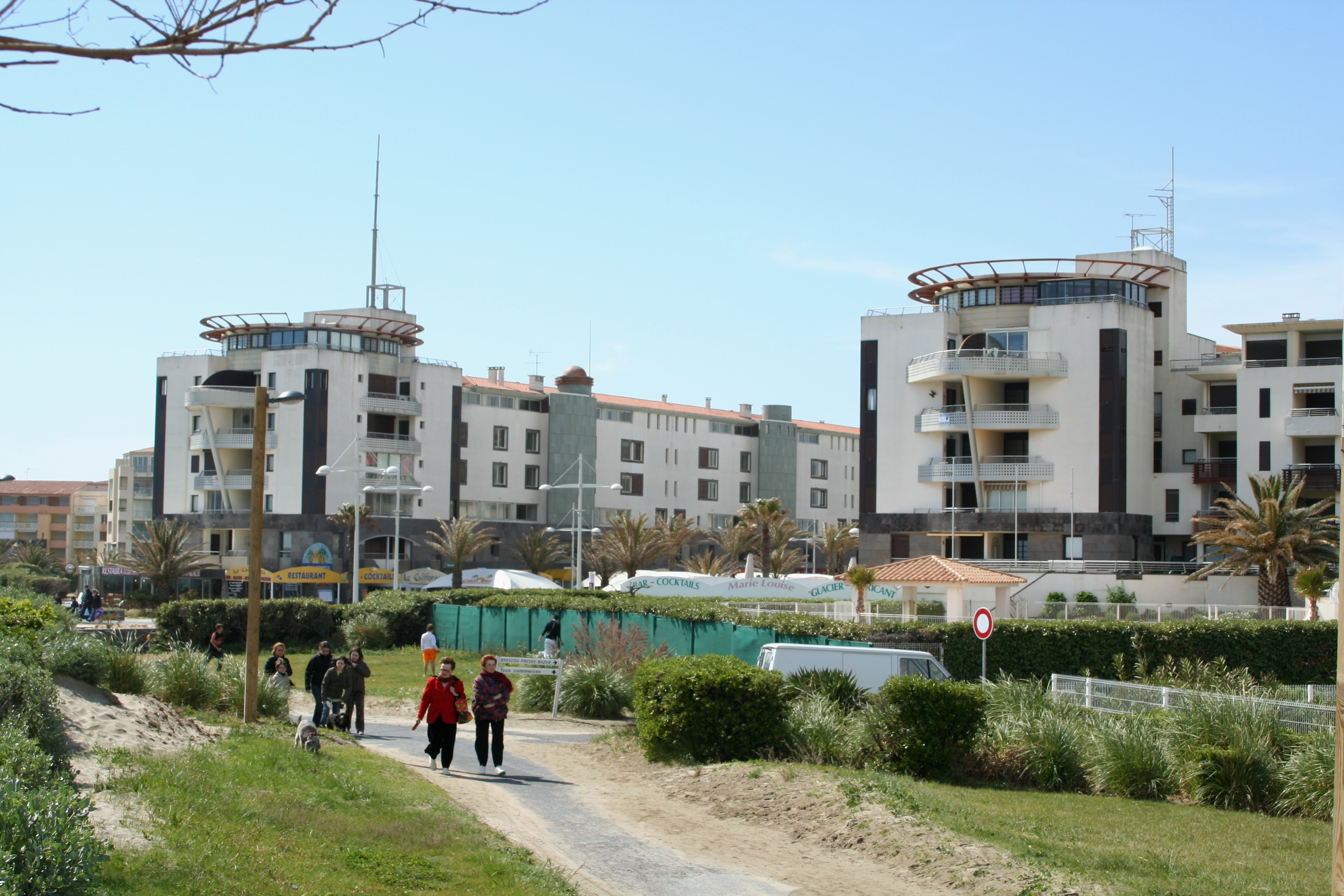 Agde (Hérault, France) : Le mail de Rochelongue au Cap d'Agde.